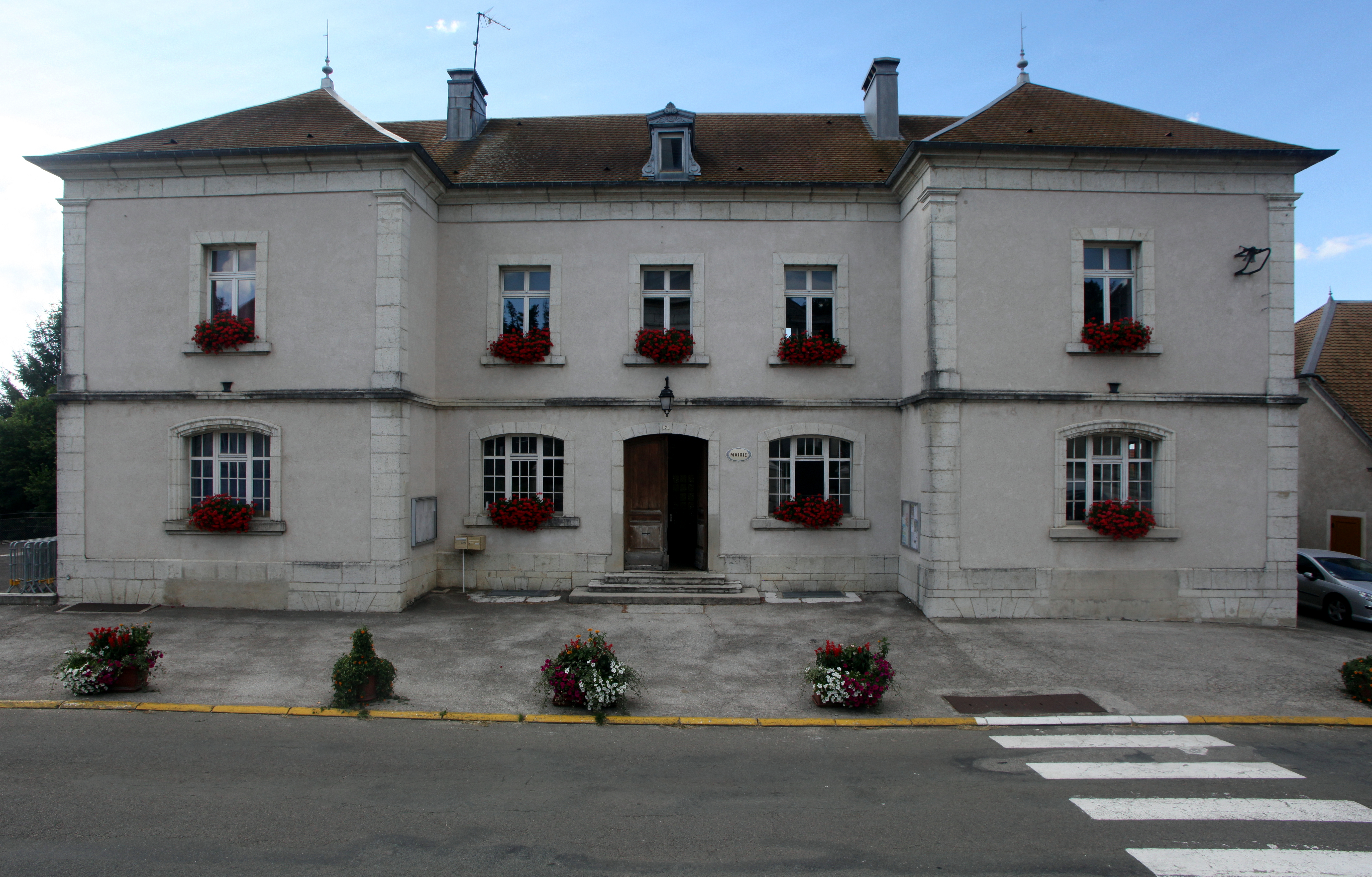 Mairie de Bians-les-Usiers (Doubs).